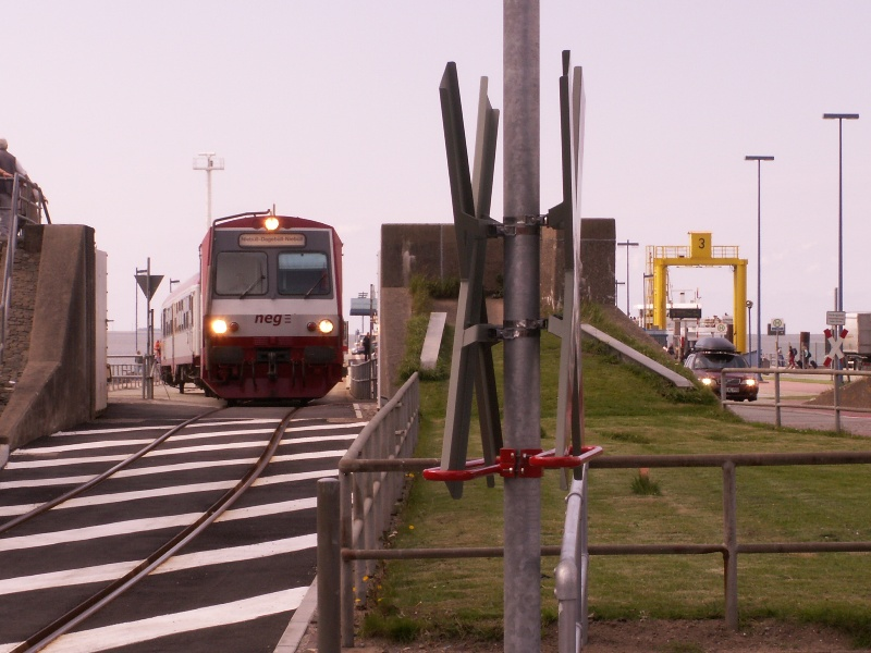 neg Niebüll